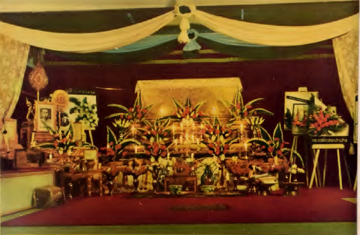 บำเพ็ญศพระเทพคุณาธาร